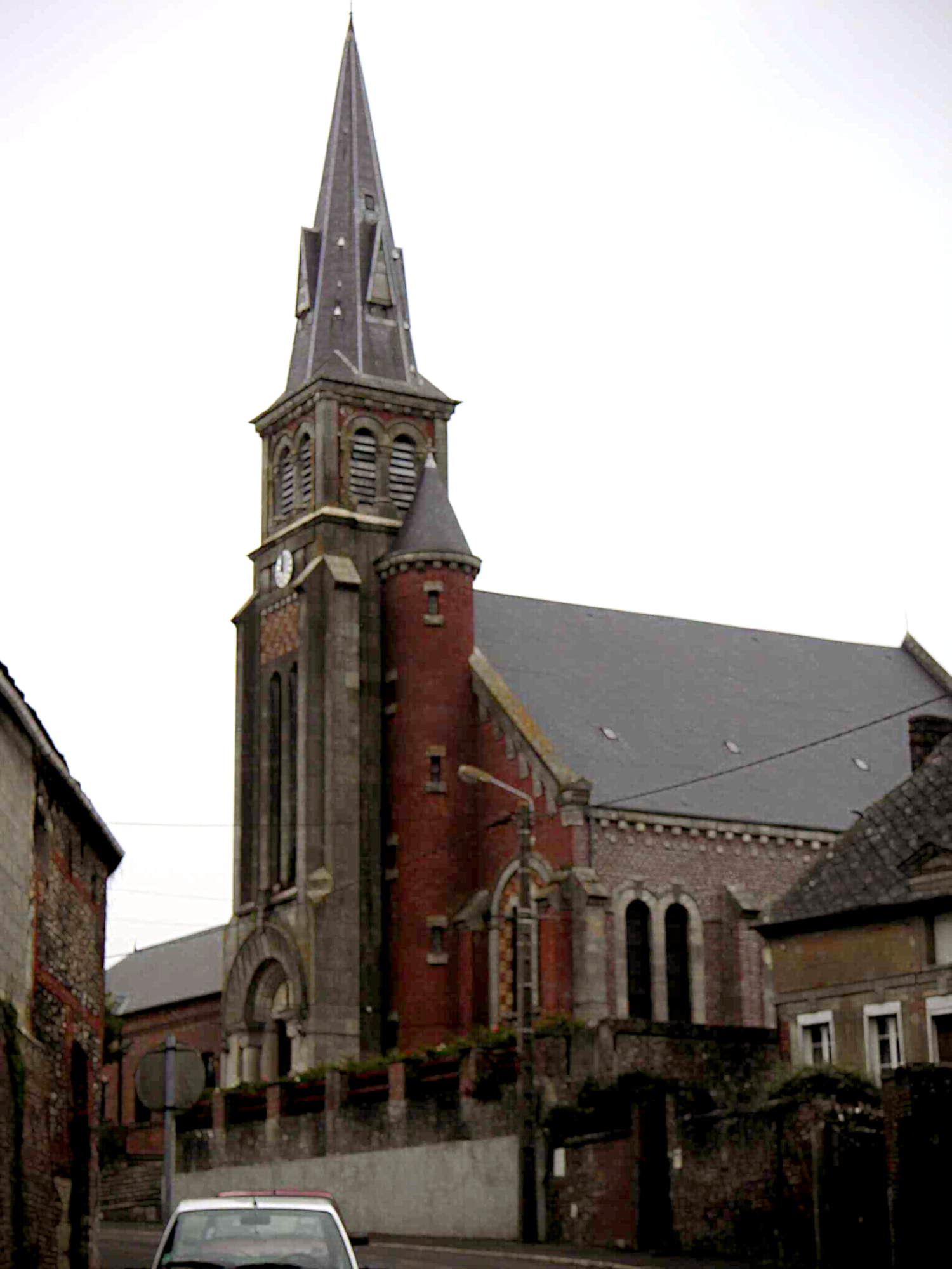 Cette photo de l'église de Saint-Germain (Commune de Lesquielles-Saint-Germain Aisne , France) a été prise par mes soins le 1er septembre 2005